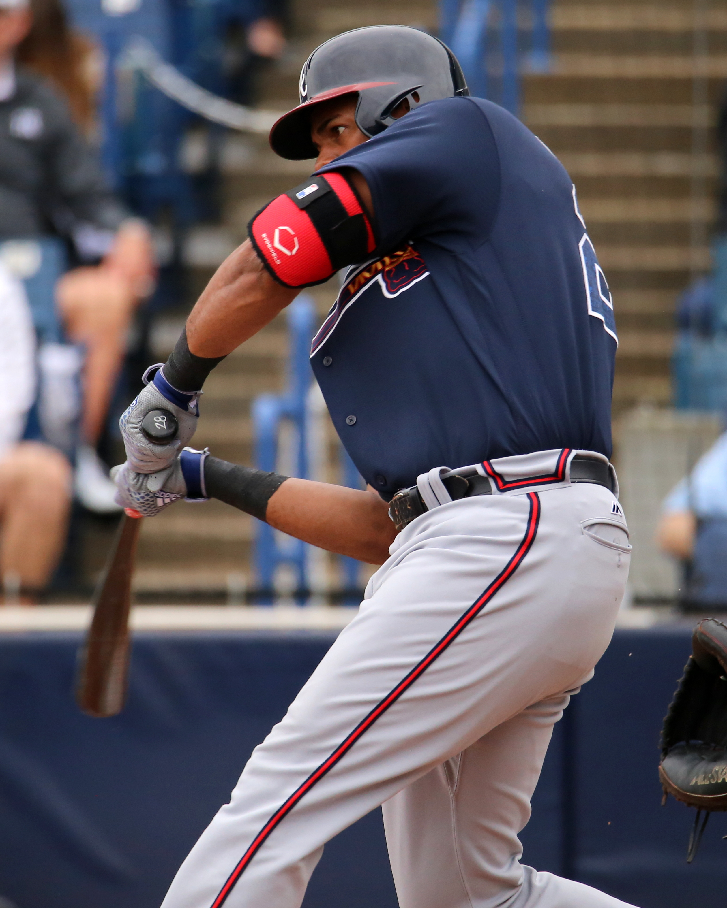 Héctor Olivera